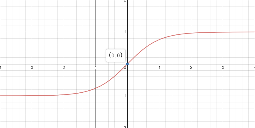 Courbe fonction similaire a la fonction signe